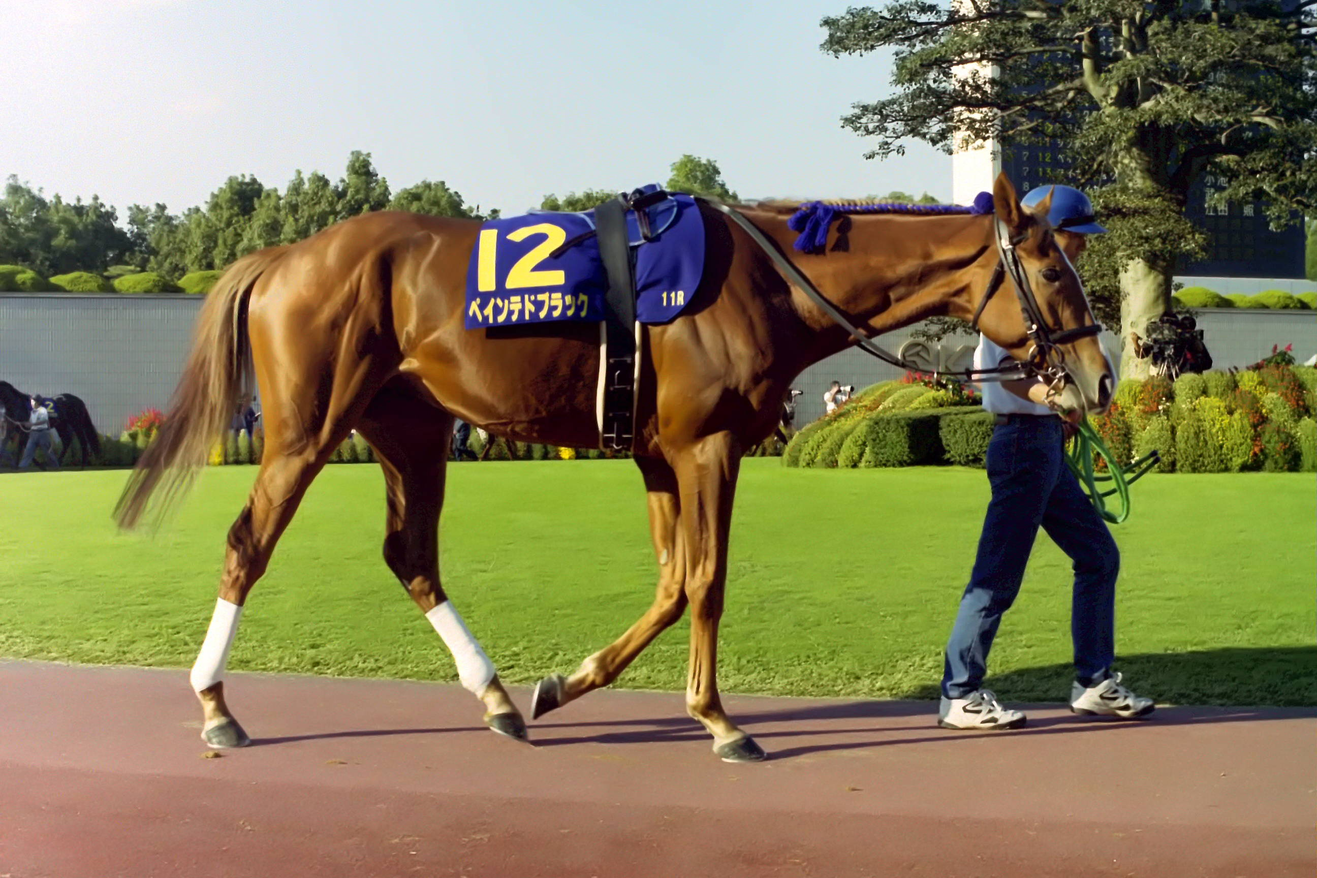 第60回菊花賞のパドックで、12番ペインテドブラック号を撮影したもの。